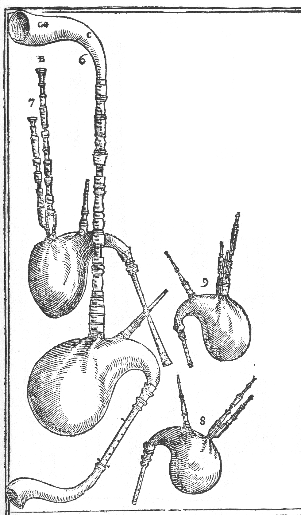 Sackpfeifen/Dudelsackformen aus Prätorius' Sntagma musicum Bd. II (Ausschnitt)